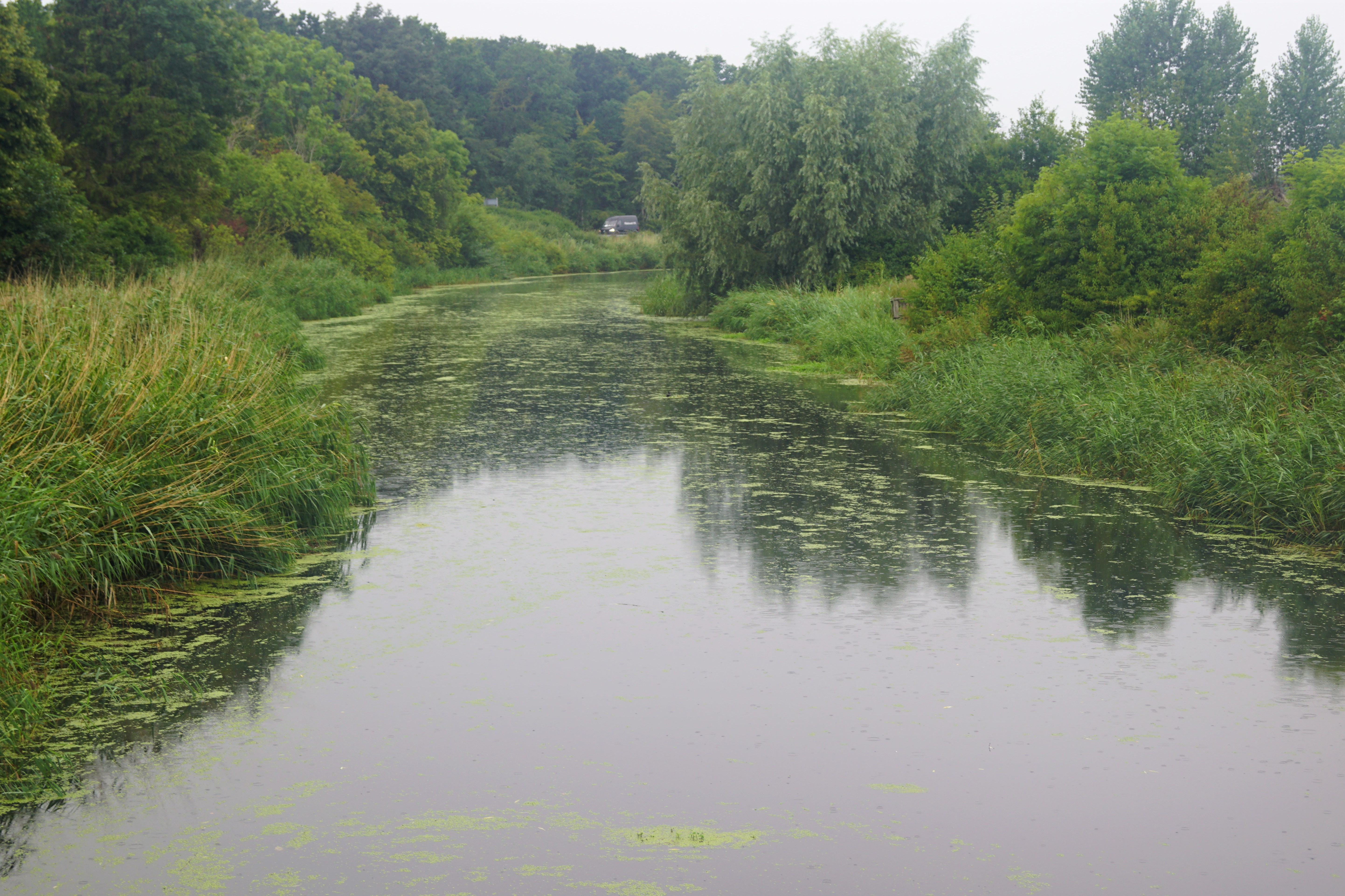 Tryggevælde Å set mod nord fra Prambro, nær udløbet